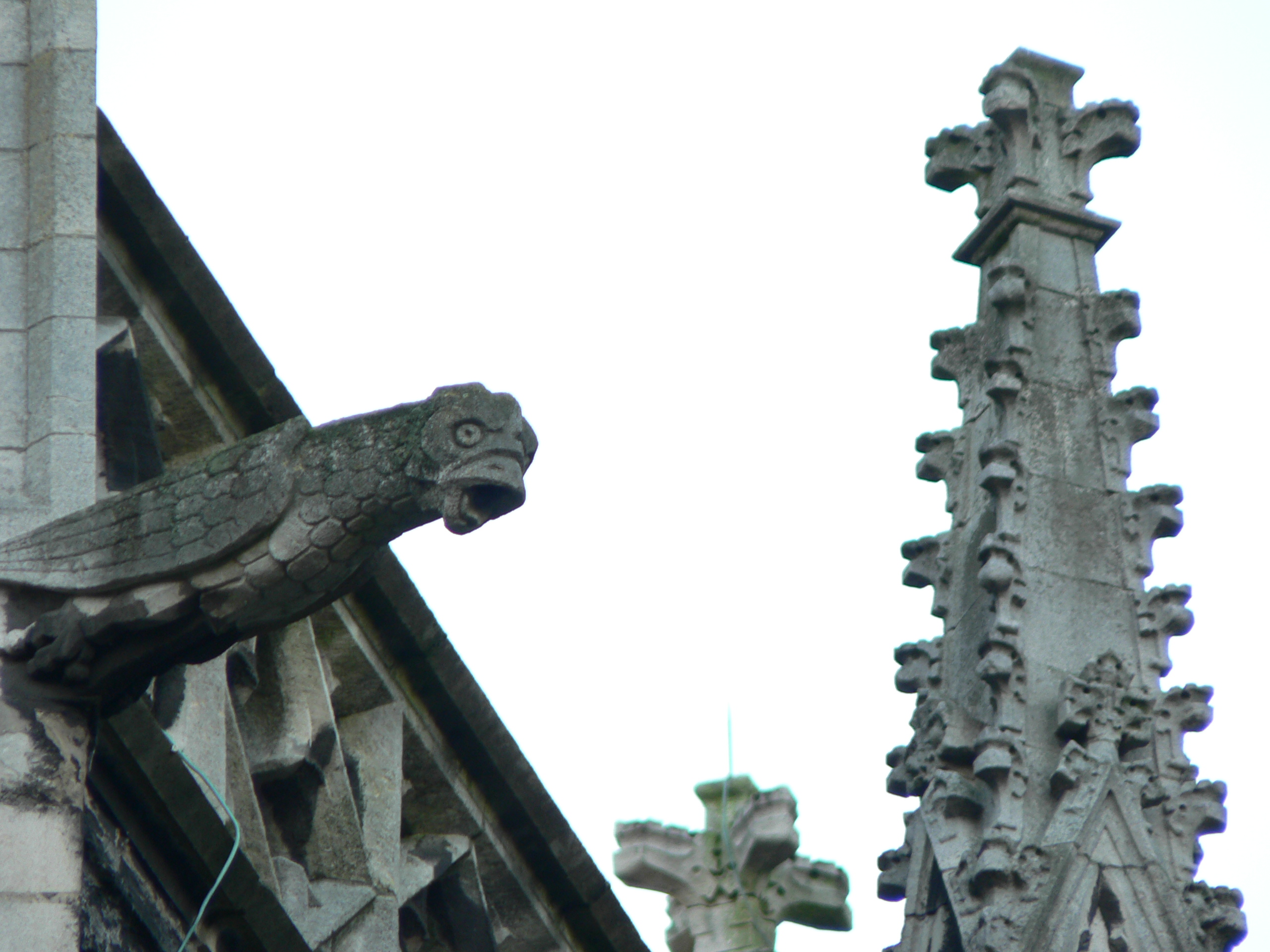 OLV-kerk, Kortrijk - own picture